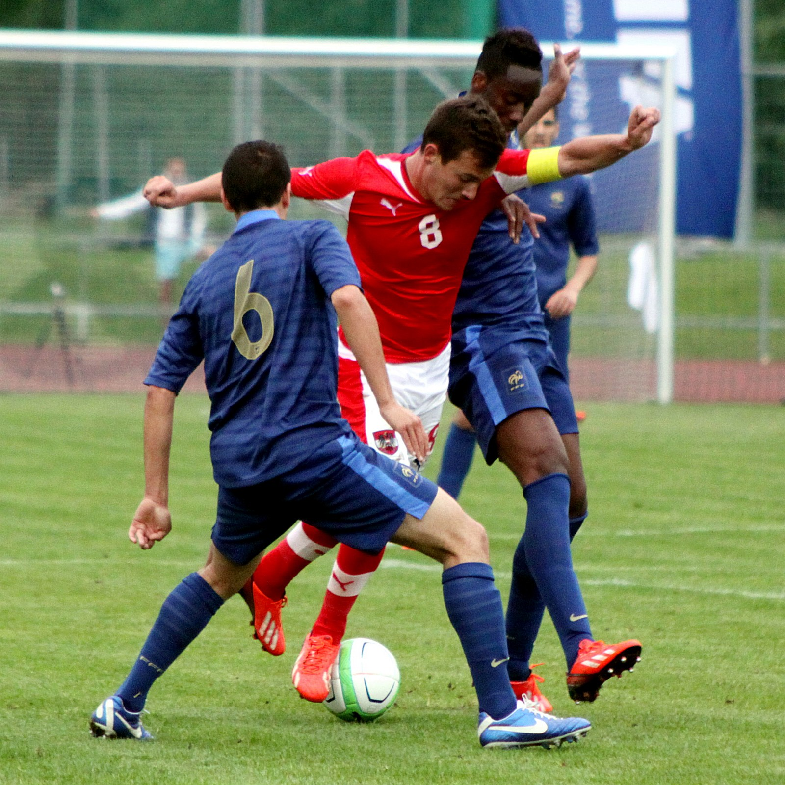 Qualifikationsspiel zur U-19 Fußball-Europameisterschaft: Österreich] gegen Frankreich am 10. Juni 2013 (0:1)] in Traiskirchen. - Das Foto zeigt von links nach rechts Larry Azouni (Olympique Marseille), Christian Gartner (SV Mattersburg) und Hadi Sacko (FC Girondins Bordeaux). en Qualification for the 2013 UEFA European Under-19 Football Championship qualification Austria vs. France (0:1) on 2013-2013-06-10 in Traiskirchen. – The photo shows from left to right Larry Azouni (Olympique Marseille), Christian Gartner (SV Mattersburg) und Hadi Sacko (FC Girondins Bordeaux).